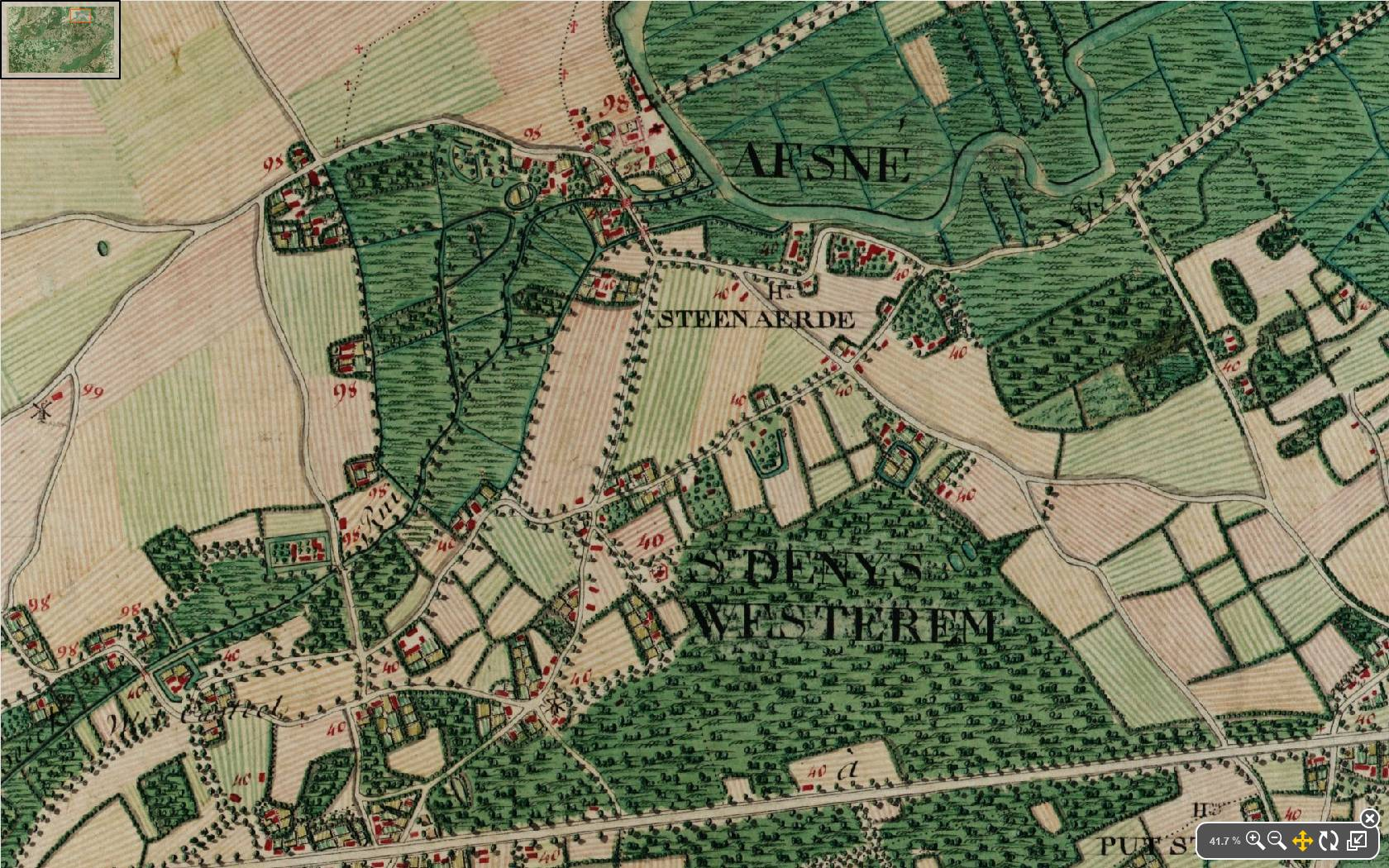 Sint-Denijs_en_Afsnee,_Belgium,_Ferraris_1775.jpg